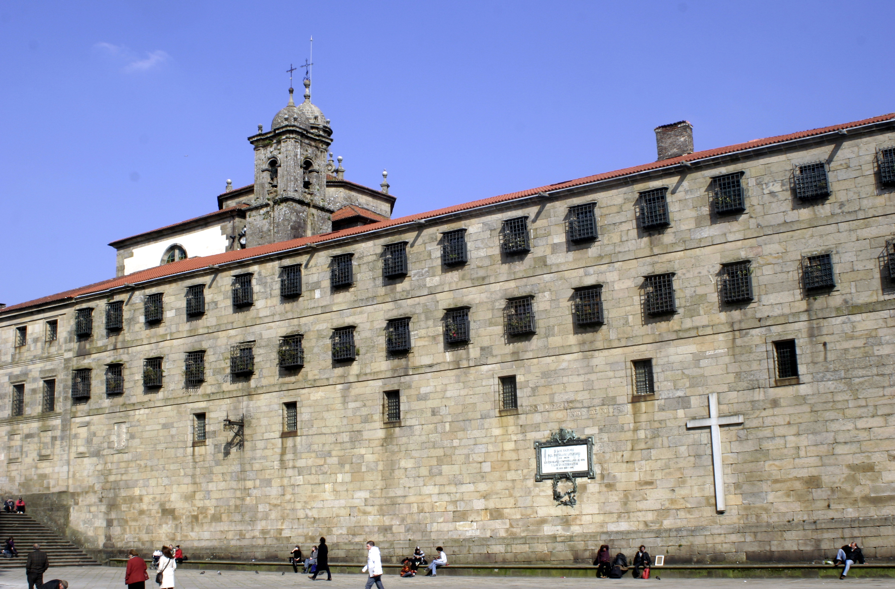 Santiago de Compostela